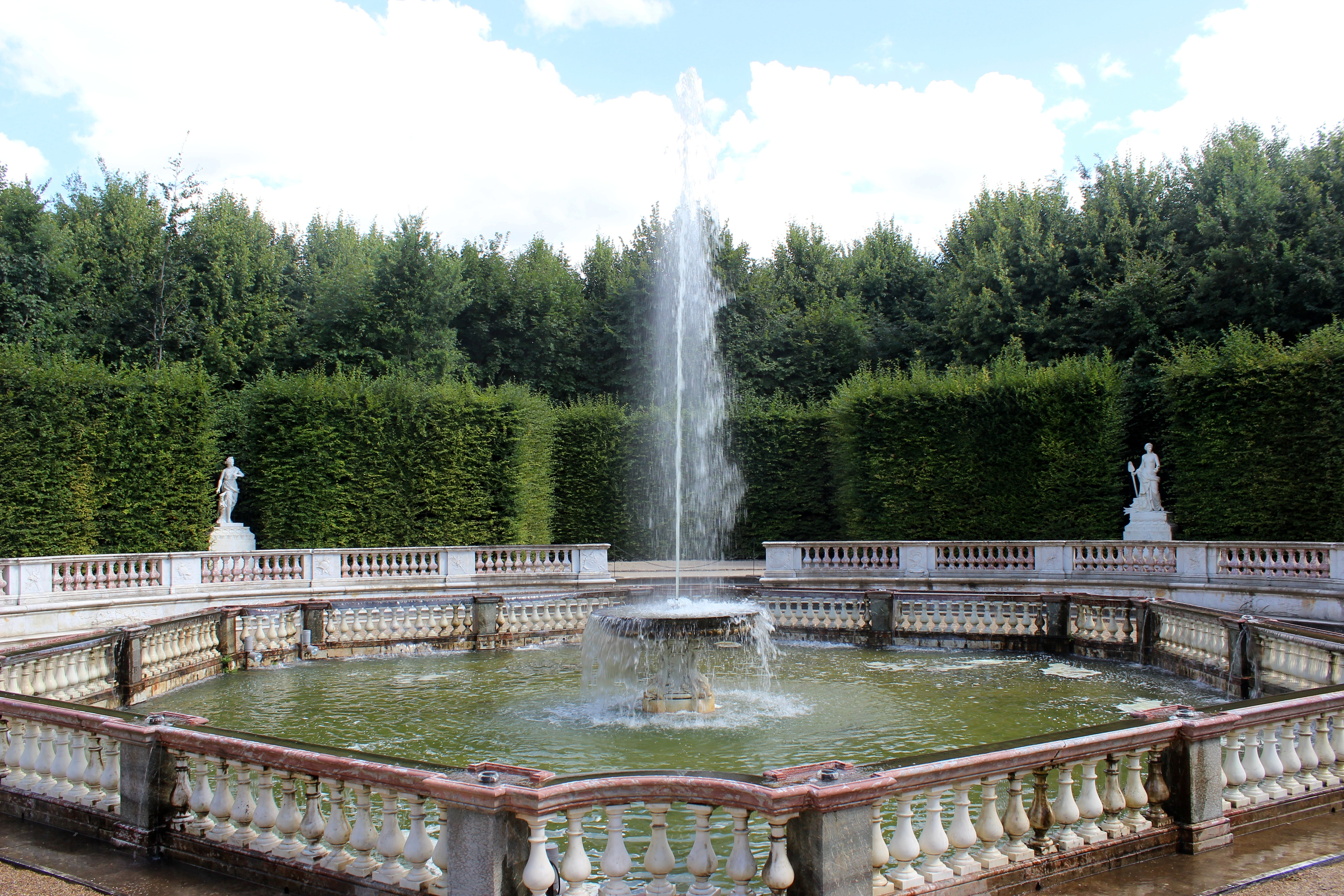 Jardín de Versalles. Bosquet des Dômes.